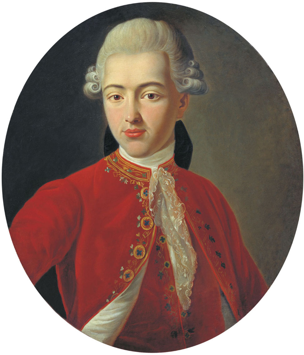 Илларион Иванович Воронцов (1760-1791)